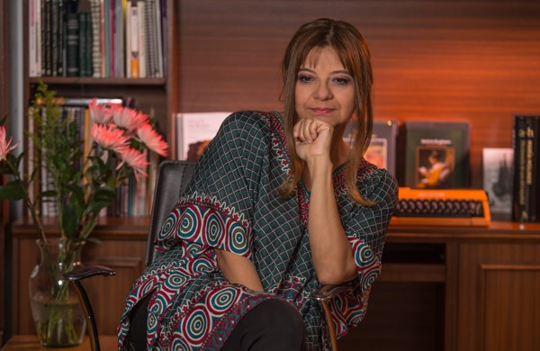 Foto de la contraportada del libro de poesía "Por fin el silencio" escrito por Isabel Agatón.